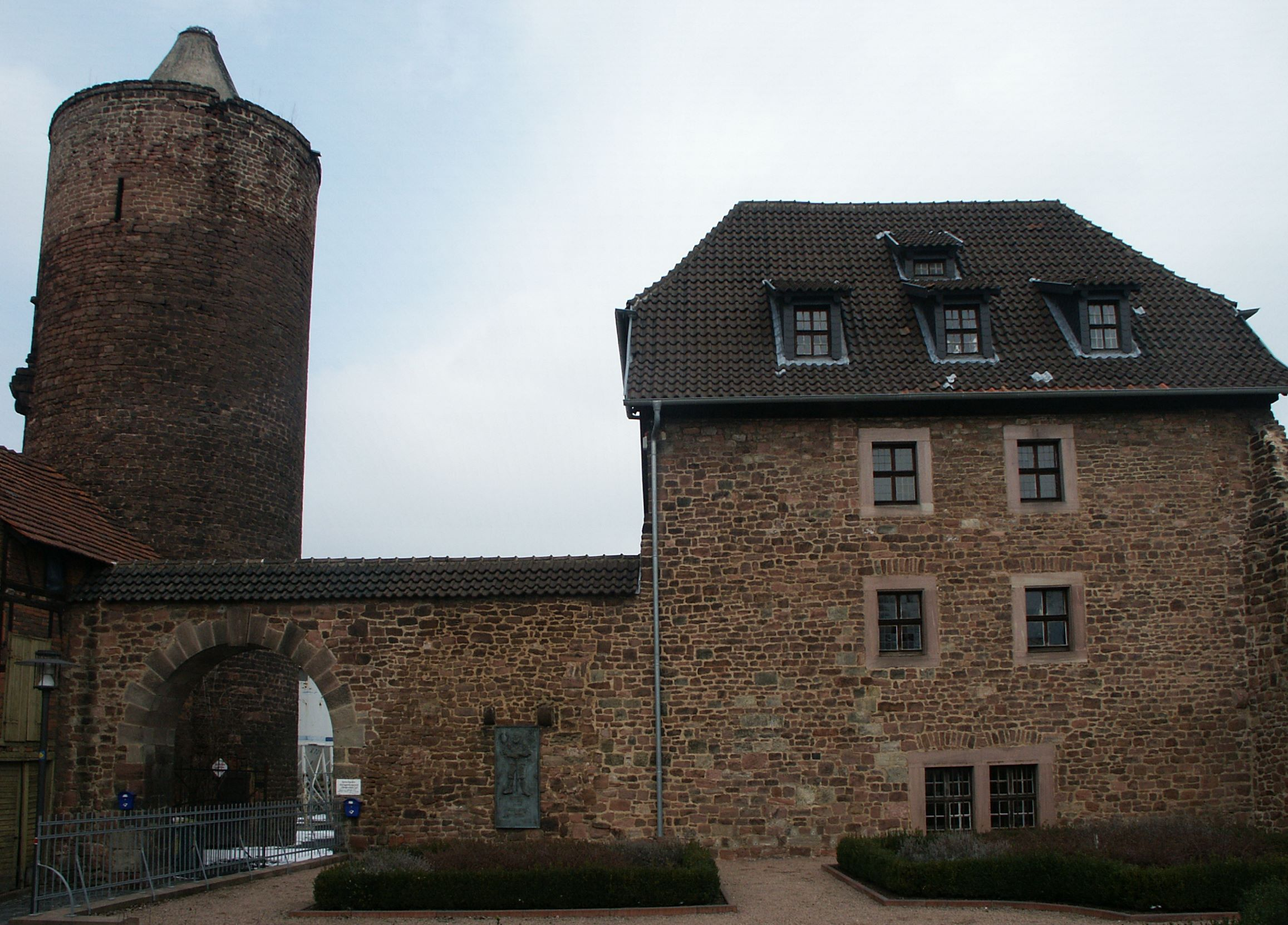 Burg Wendelstein, Ansicht innerhalb der Stadt.